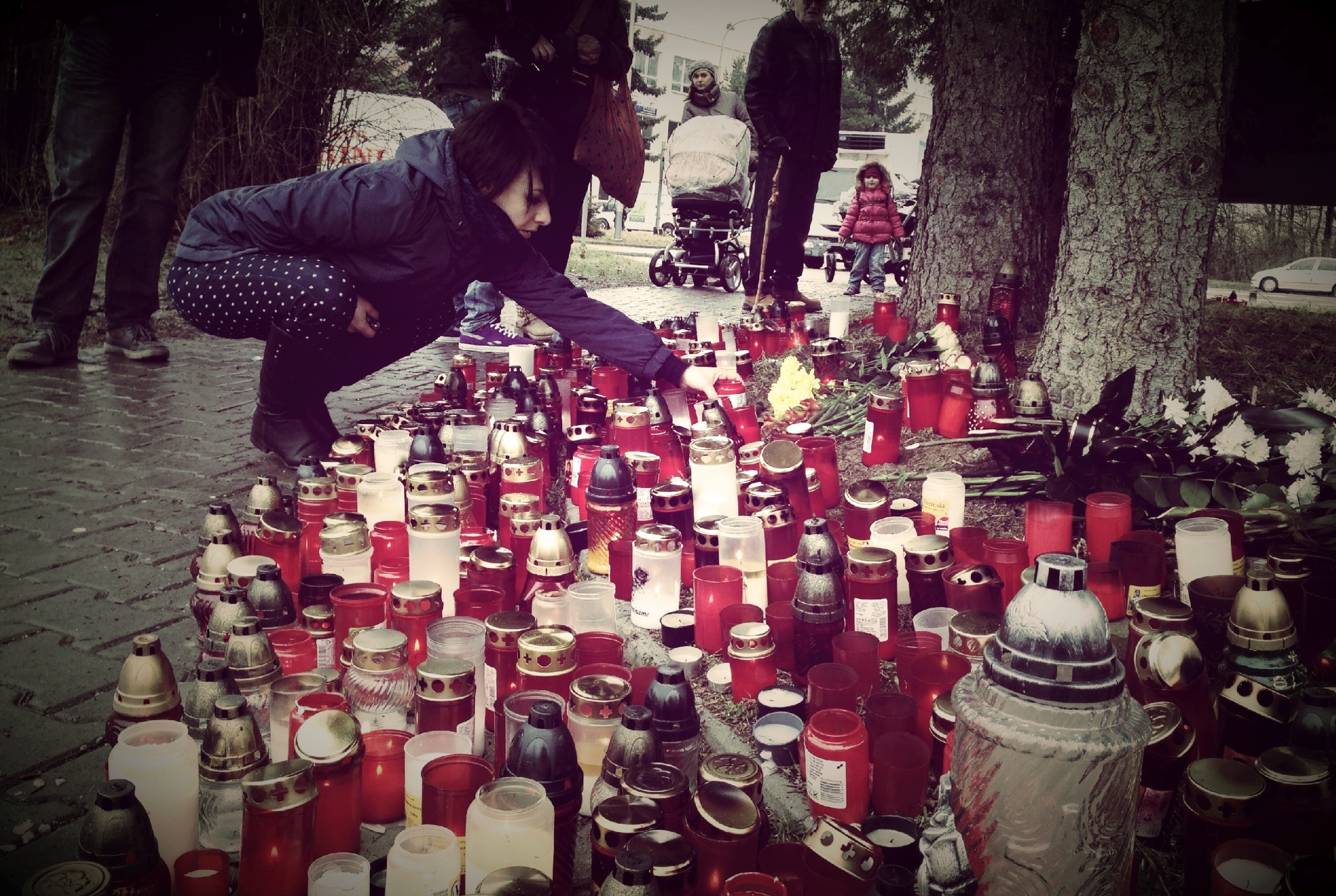 uherskybrod